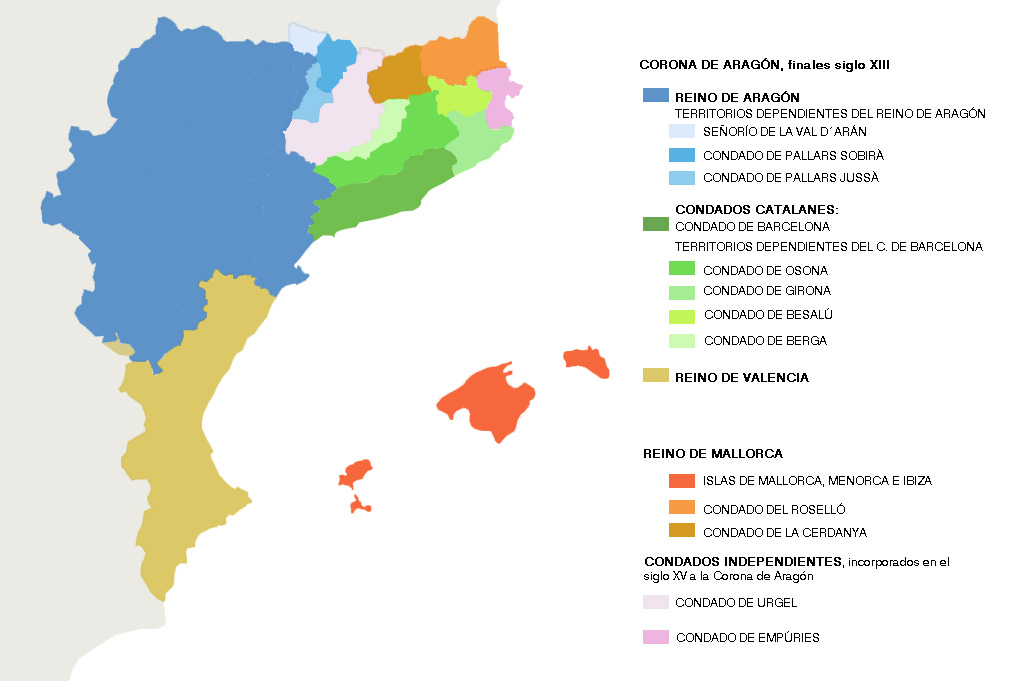 La corona de Aragón en el siglo XIII en los territorios de la península ibérica